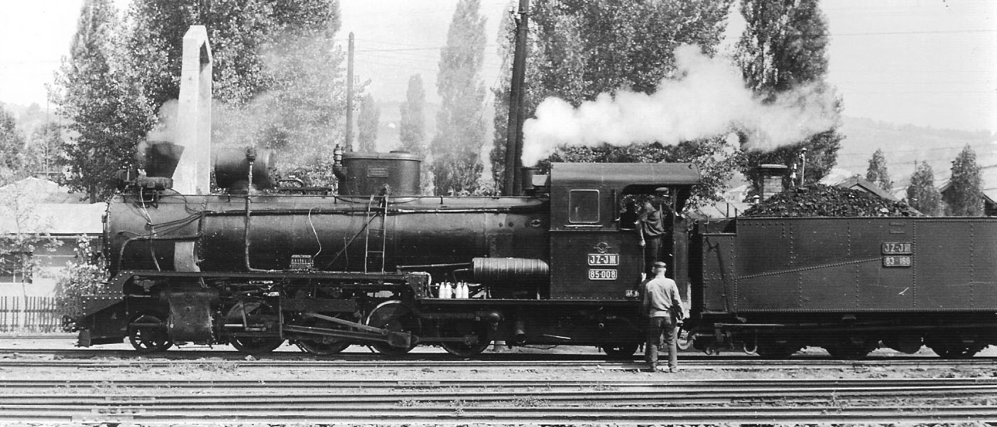 Lokomotive der BR 85-008 im Schmalspurbahnhof Sarajevo